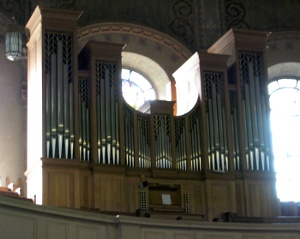 Christuskirche in Mannheim-Oststadt.